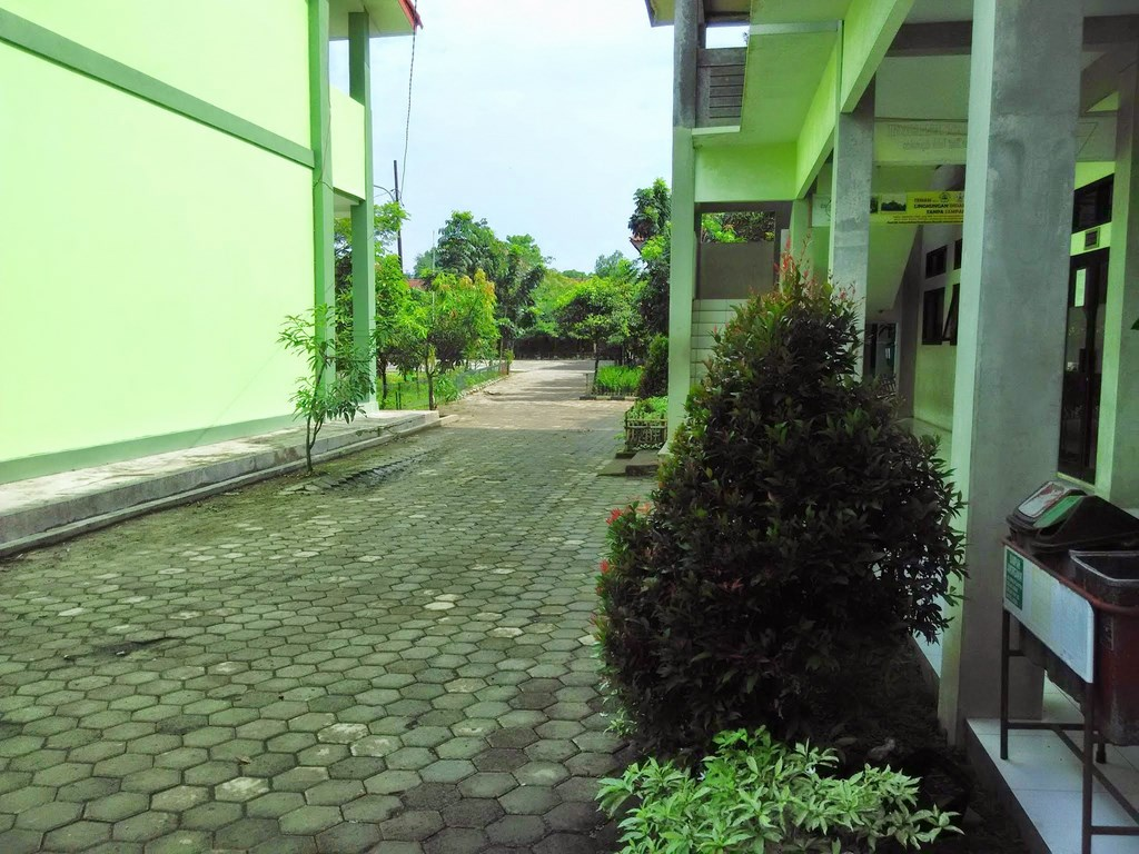 Teras ruang kelas